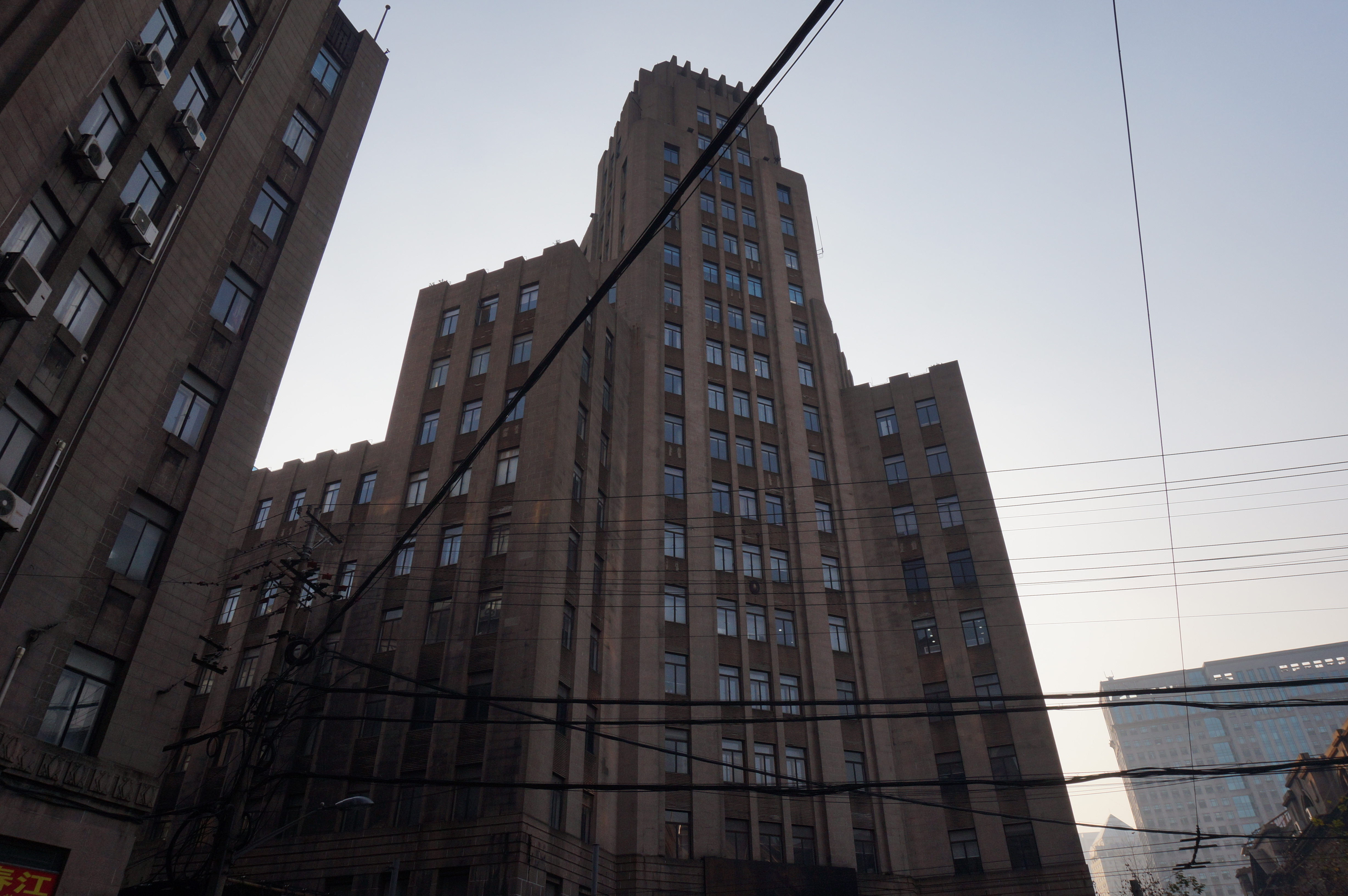 中文（中国大陆）: 江西中路建设大楼